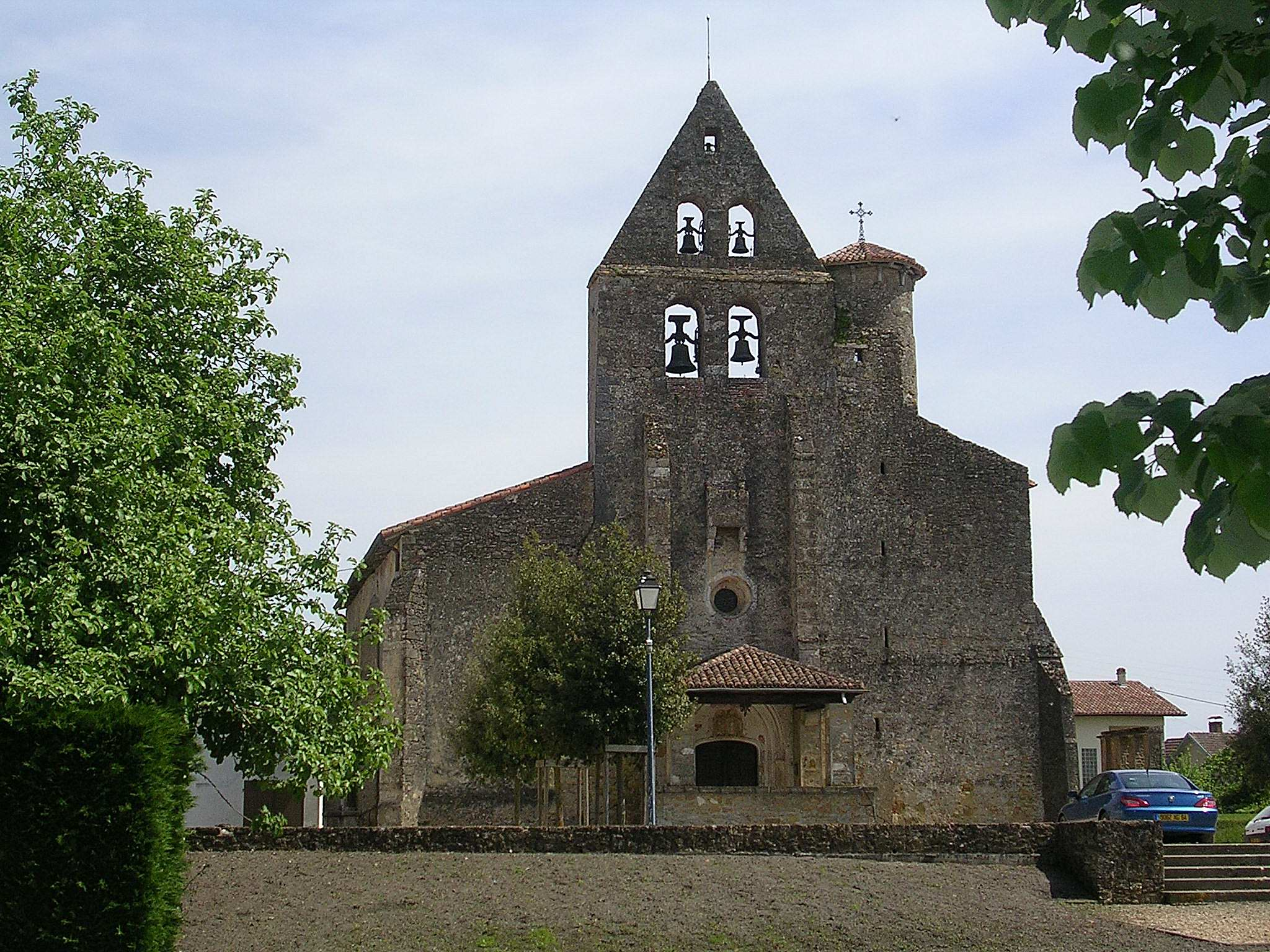 Eglise saint-Amand, à Bascons, dans le département français des Landes